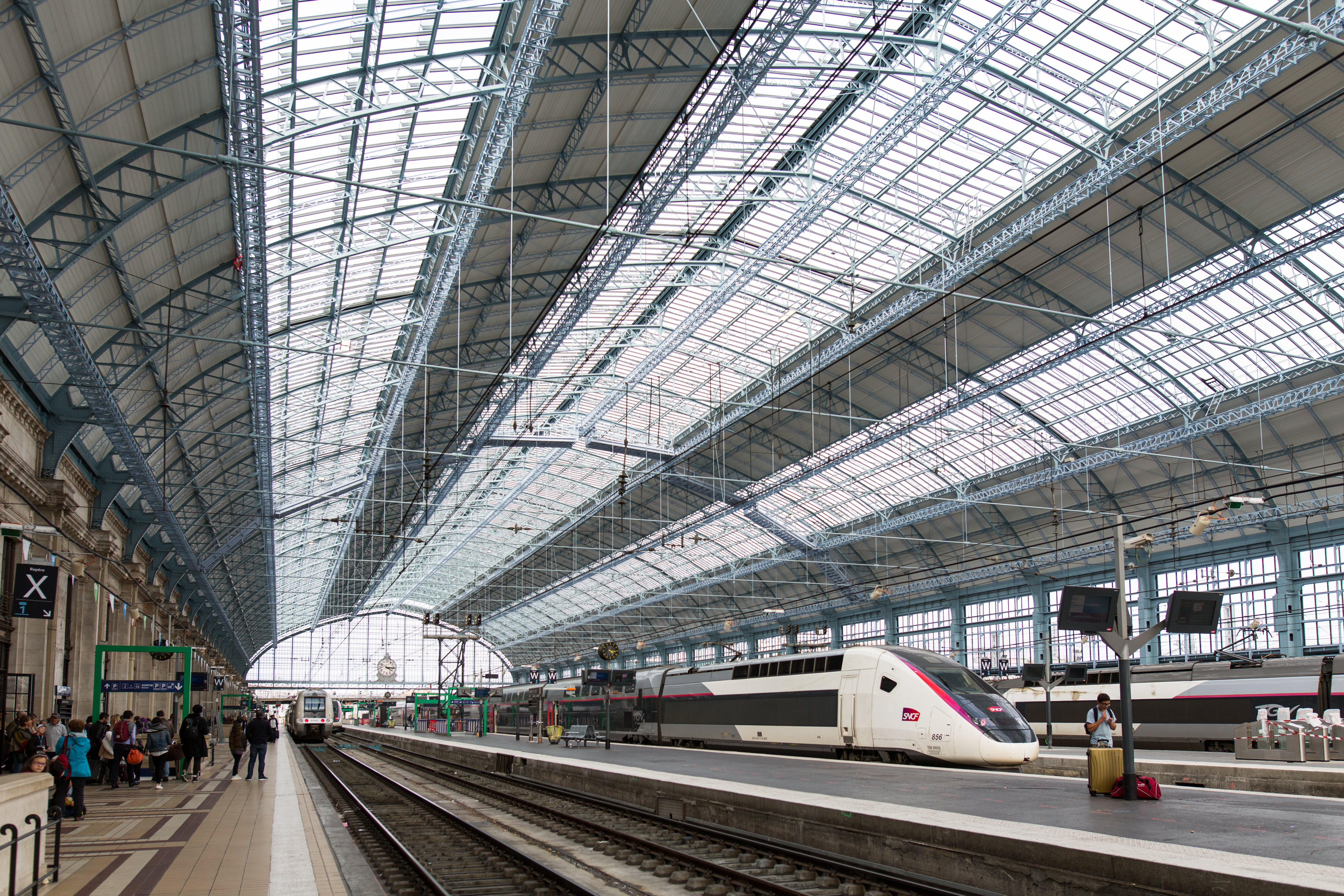 Hall de la gare Saint-Jean après rénovation